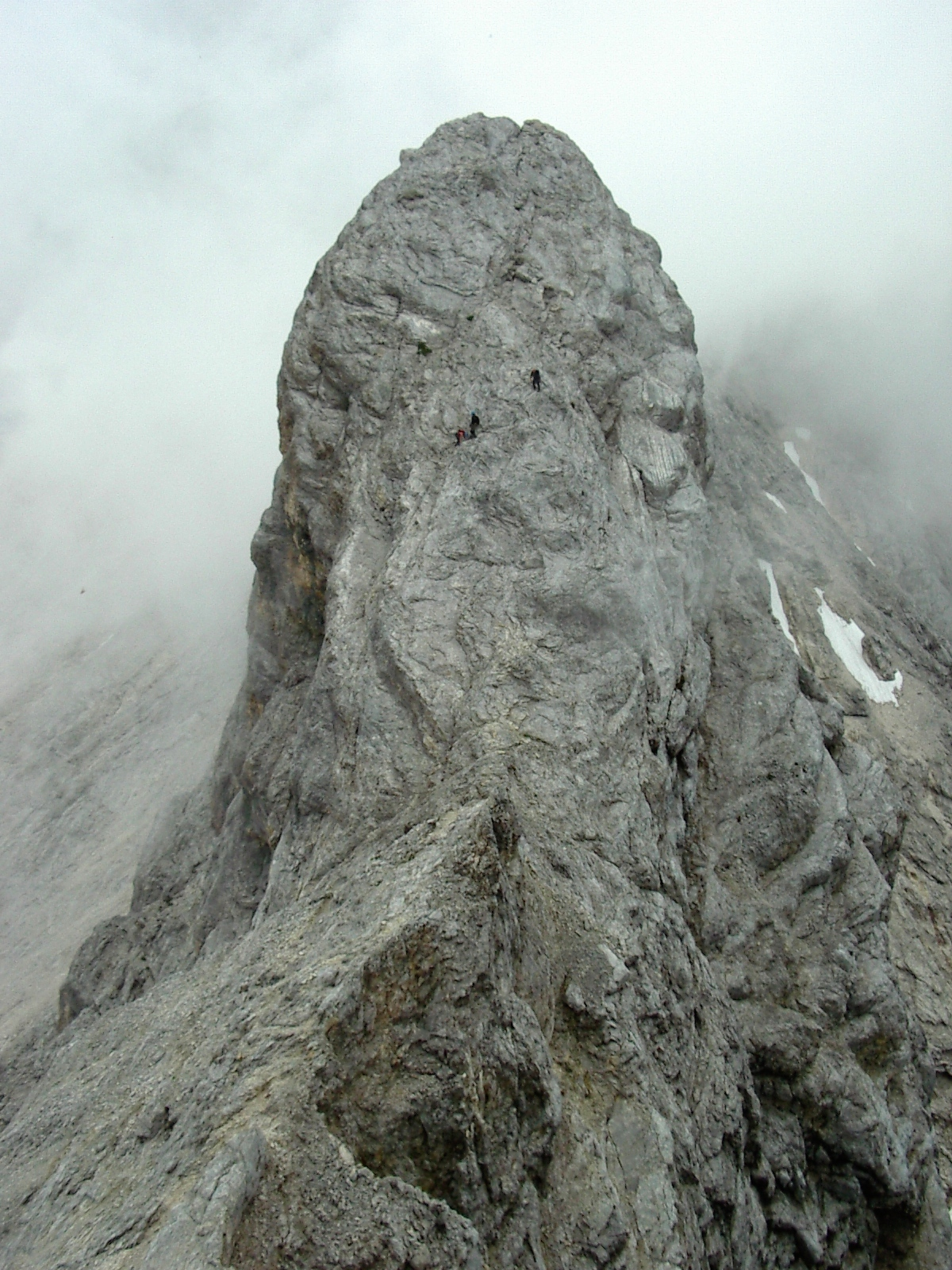 Die Vollkarspitze gesehen vom Jubiläumsgrat aus Ost